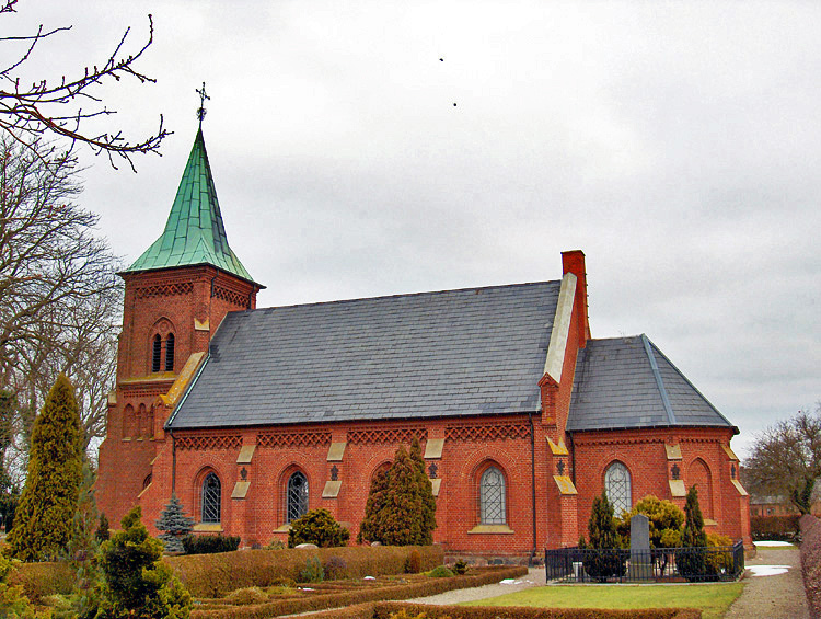 fra syd